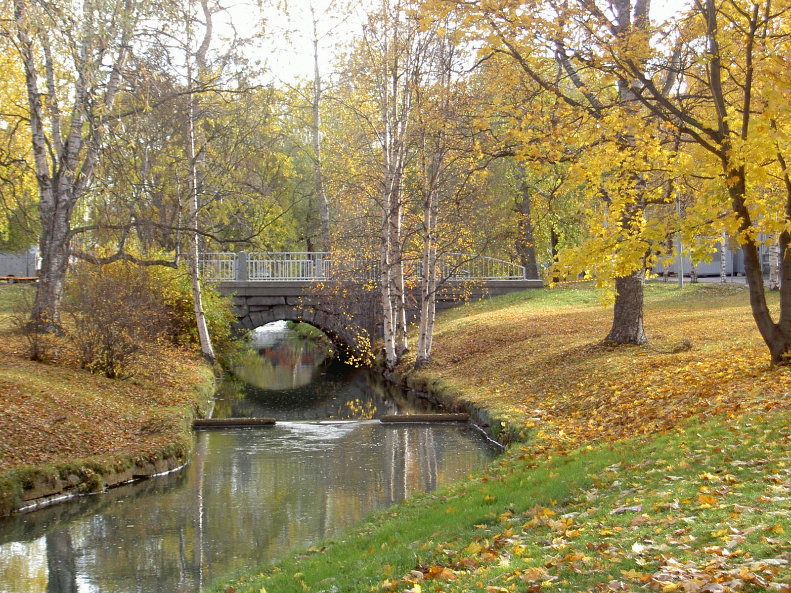 Sajat digitalis kamera. --Math 2005. augusztus 1., 17:58 (CEST) hivatkozando forras: Brendel Matyas